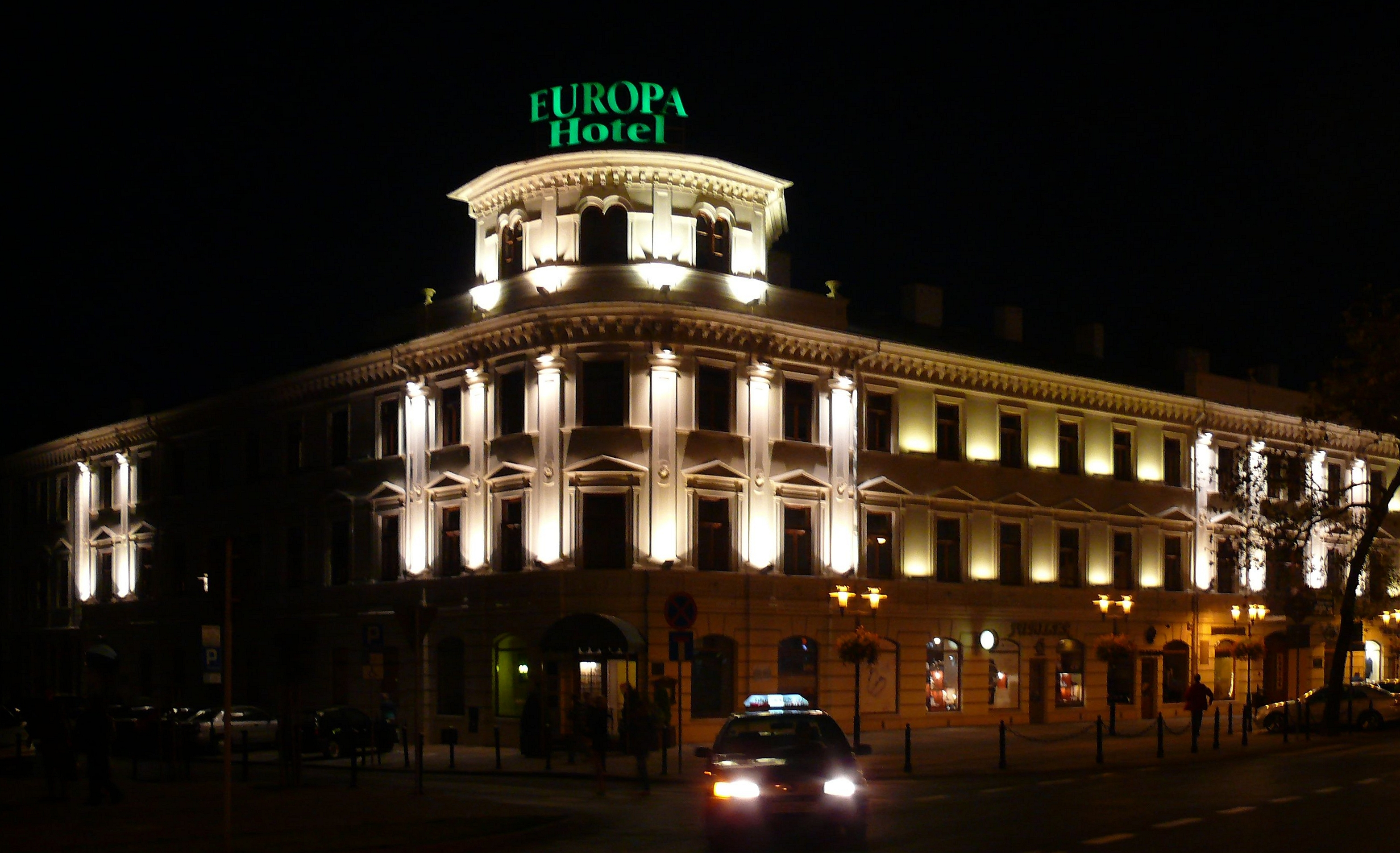 odrestaurowany hotel "Europa" w Lublinie - w rej. zabytków nr A/502 z 13.05.1971